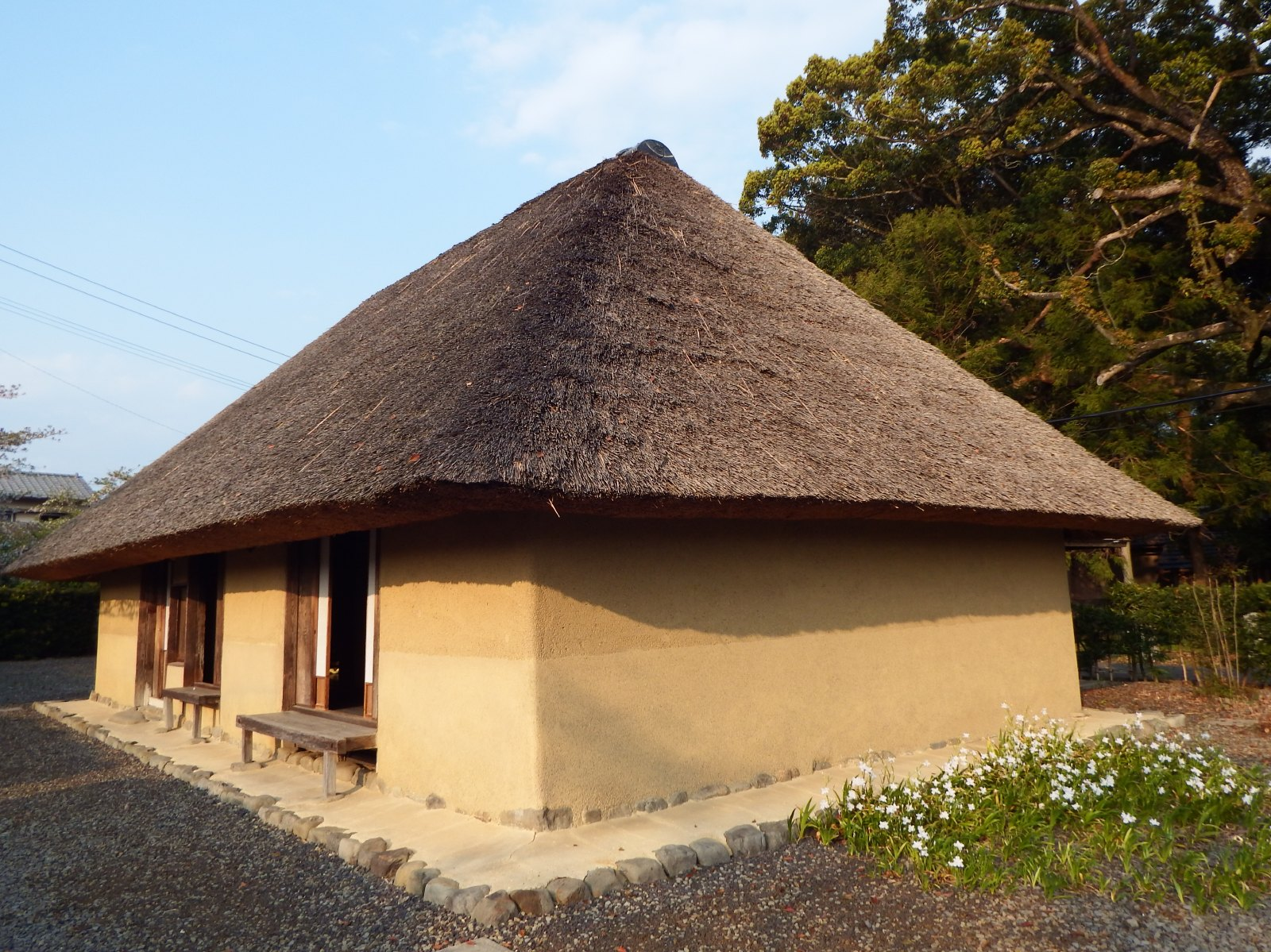 旧長岡家 外観